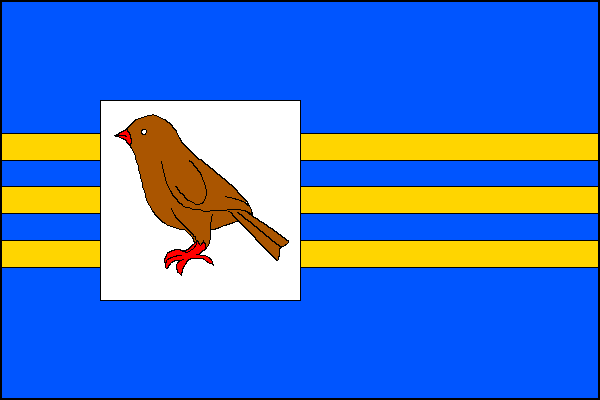 vlajka, Drozdov, okres Šumperk